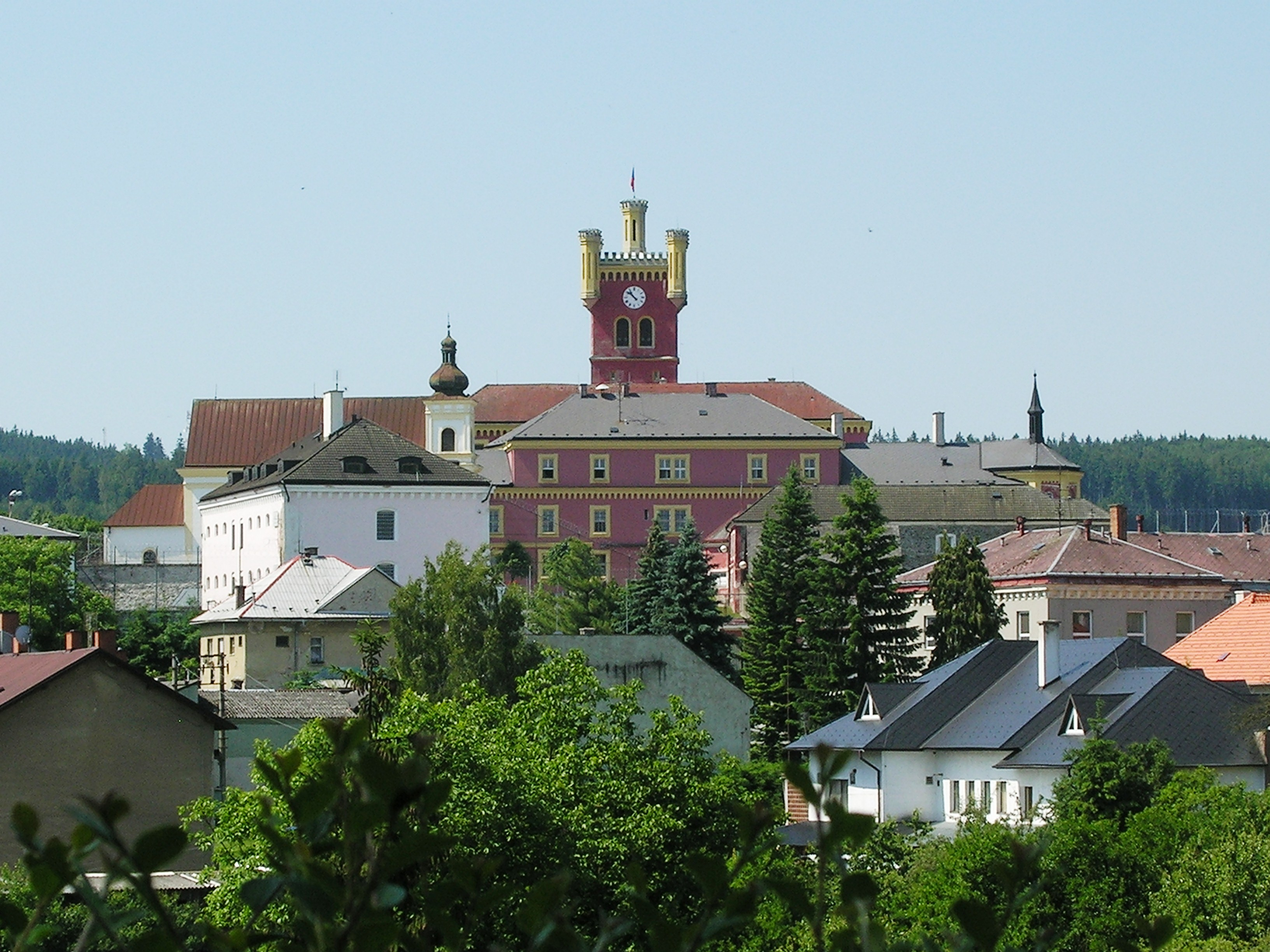 Hrad Mírov s kostelem sv. Máří Magdalény (Mírov)